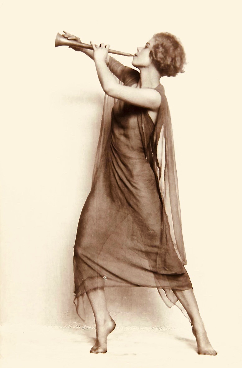 Katharina Stern (1897–1984), Künstlername Katta Sterna, deutsche Tänzerin und Filmdarstellerin